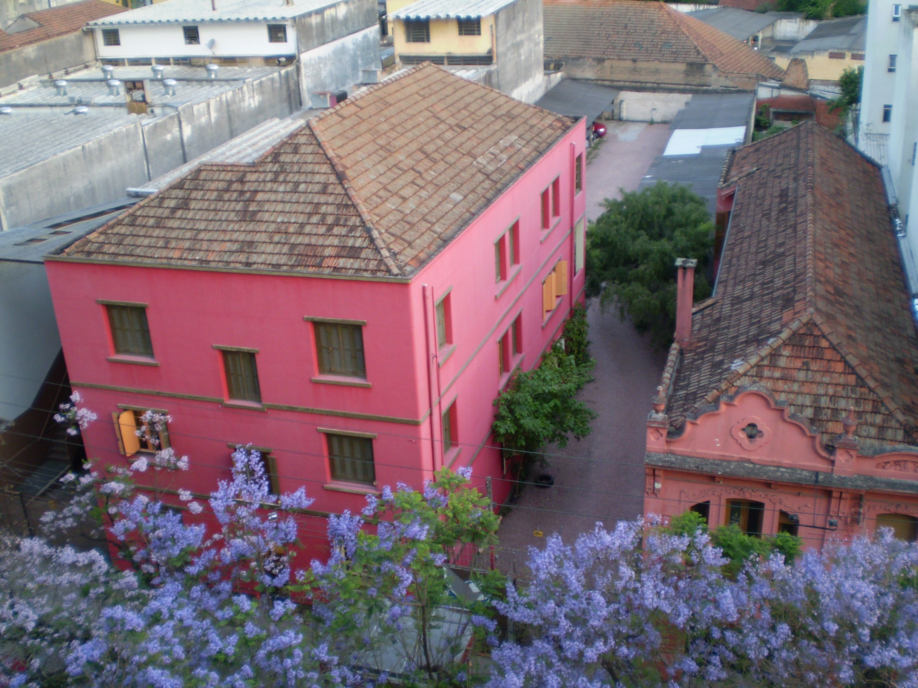 Bairro de Porto Alegre Cidade baixa, visto desde a rua da República.